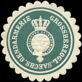 Sealing stamp Title: Grossherzoglich saechsische Gendarmerie Description: geprägt, grün, weiß Place: Weimar size: 4 cm